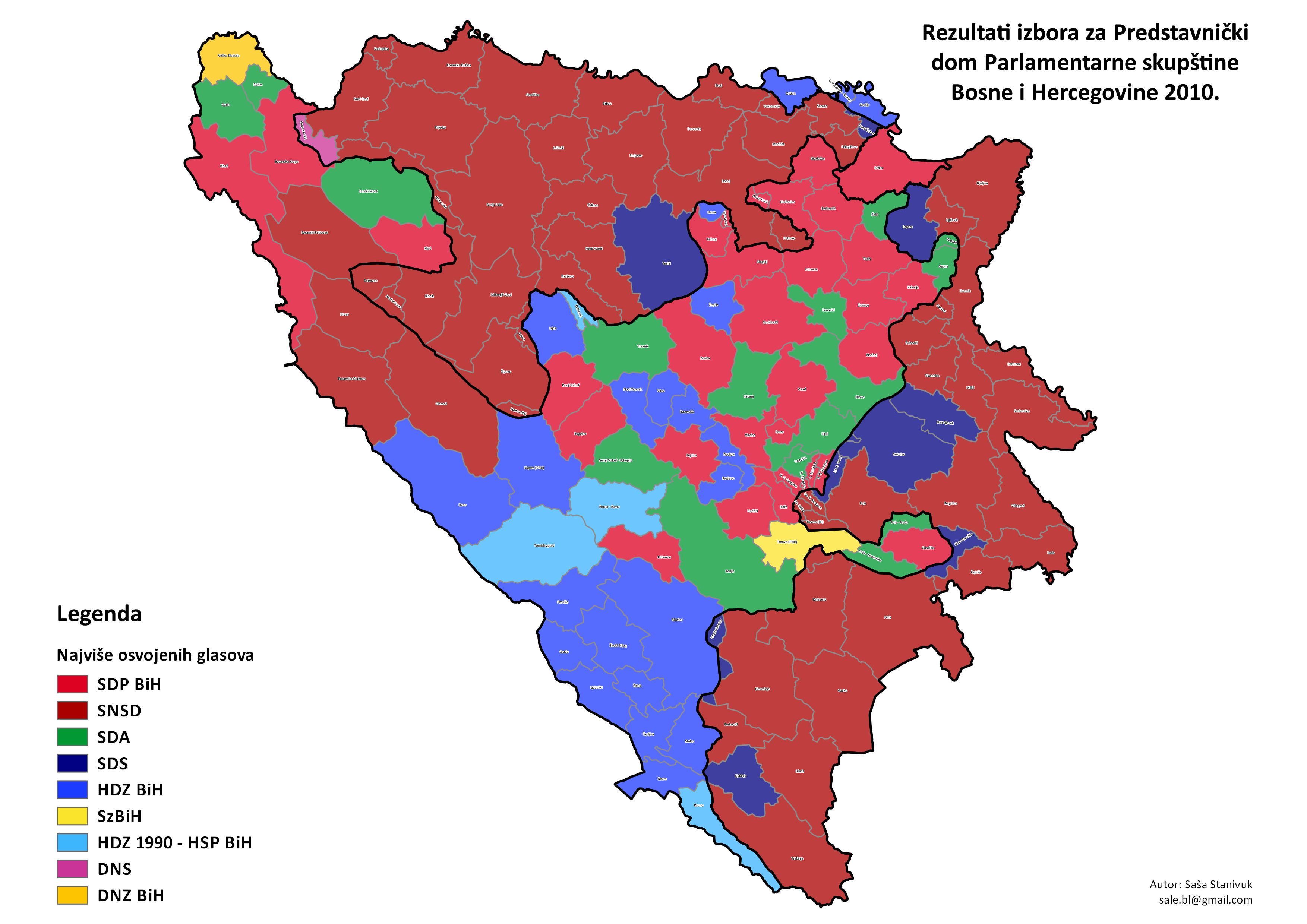 Srpskohrvatski / српскохрватски: Izbori za Parlamentarnu skupštinu BiH 2014. godine